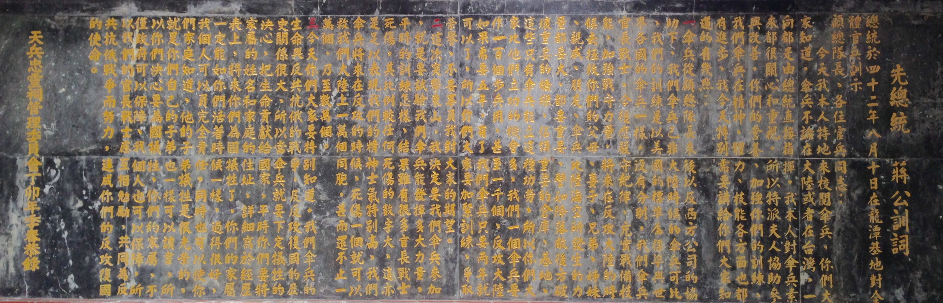 中文（台灣）: 天兵忠靈祠總統訓詞，1953年（中華民國42年）8月10日中華民國總統蔣中正在陸軍龍潭基地對全體官兵訓示。